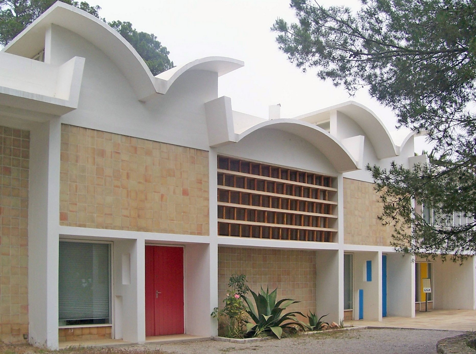 Miró-Stiftung Palma, Werkstatt